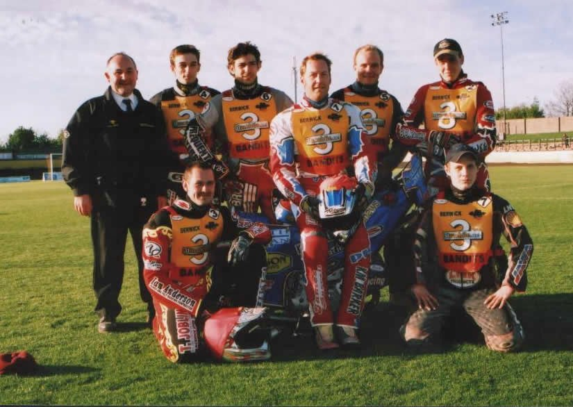 Piloto argentino que compitió durante 13 años en motociclismo hasta su accidente en 2003 que lo dejo en silla de ruedas, y a partir del 2007 compitió en Automovilismo siendo el primero con un traumatismo medular .